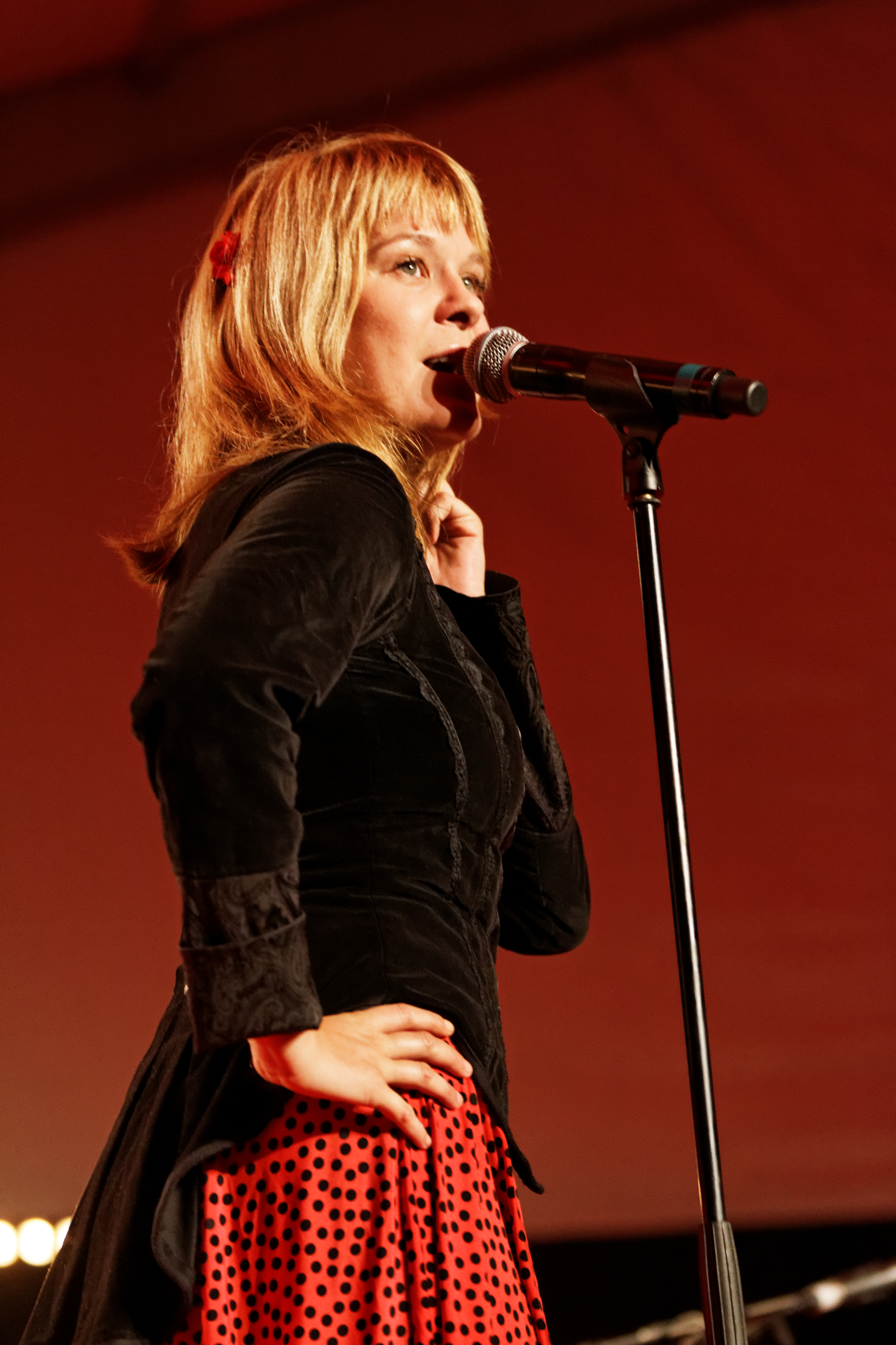 Agnès Bihl en concert sur la scène de l'Agora lors de la Fête de l'Humanité 2013.